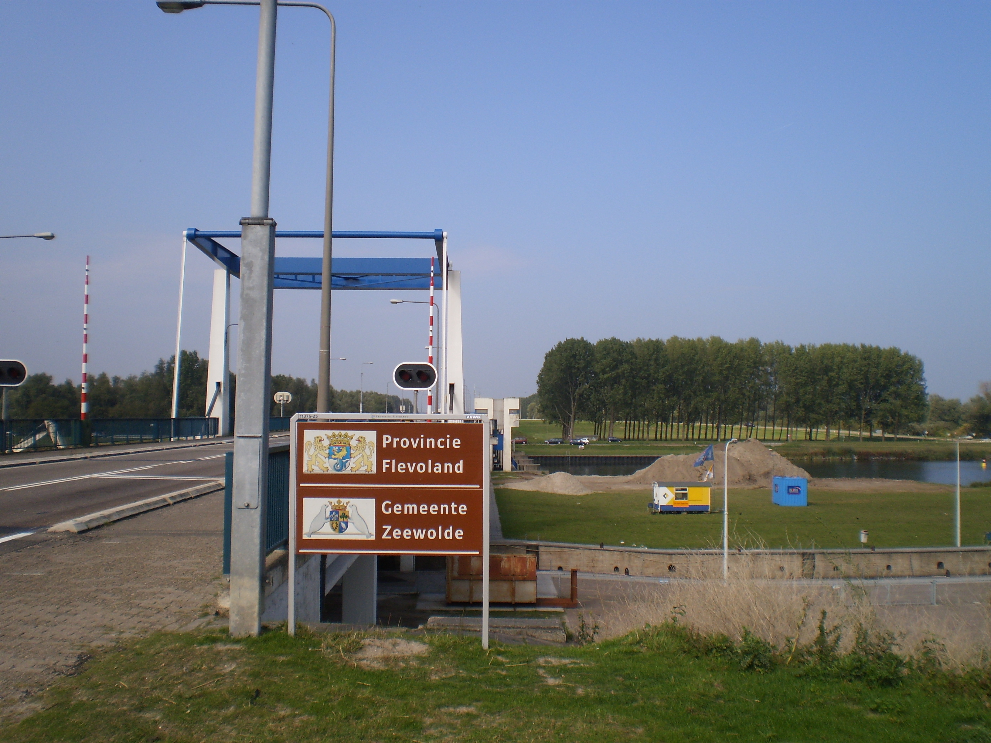 Brêge yn de N301 oer it Nijkerkernau